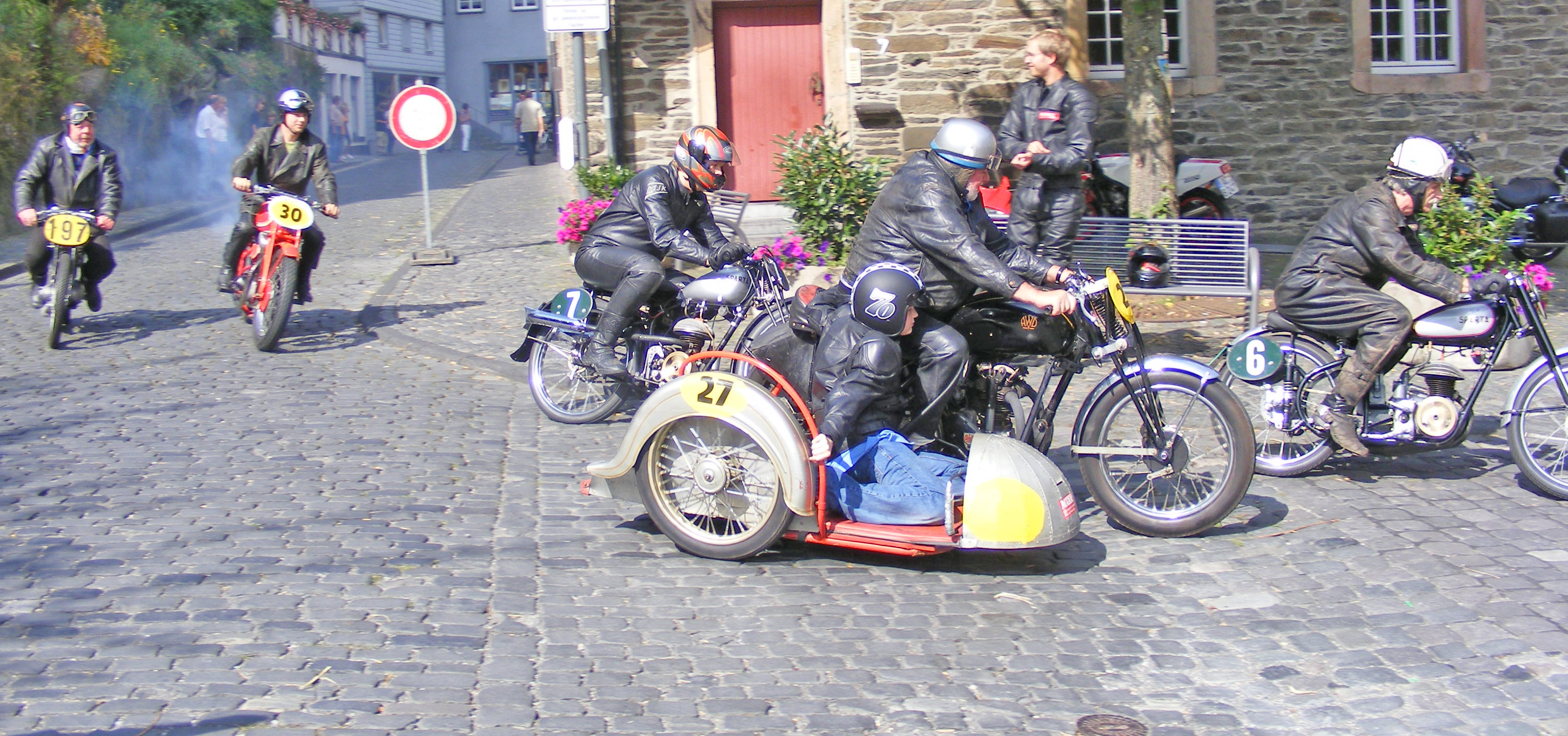 Oldtimer Rennen RUndkurs des ehemaligen Burgringrennens in Monschau ab 1948 Monschau 2008